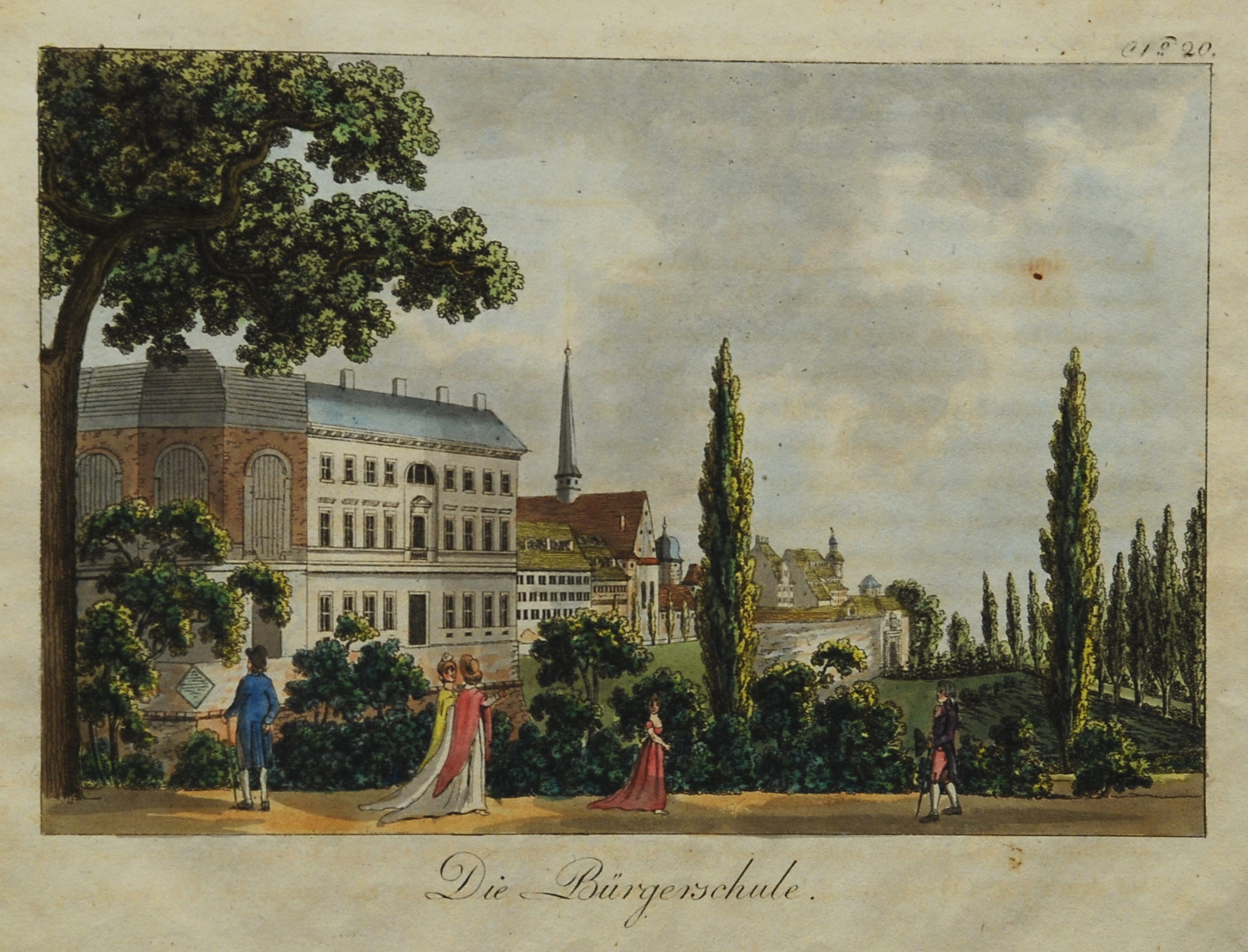 Leipzig 1804 Die Bürgerschule Aquarellierter Kupferstich 15,5 x 21 cm (Plattenrand) aus: Schwarz, Karl Benjamin: Romantische Gemählde von Leipzig. Eine Folge von vier und zwanzig Prospecten gezeichnet und gestochen von Karl Benjamin Schwarz. Leipzig: Karl Tauchnitz 1804, 56 S. + 23 aquarellierte Kupfertafeln + 1 nicht kolorierter Stich. Carl Benjamin Schwarz: Vedutenstecher, Zeichner, Radierer, Farbstecher und Aquarellist (*1757 Leipzig, † 21.10.1813 ebenda). Schüler Oesers; Kustos an der Winklerschen Kunstsammlung (THIEME-BECKER Bd. 30, S. 365).